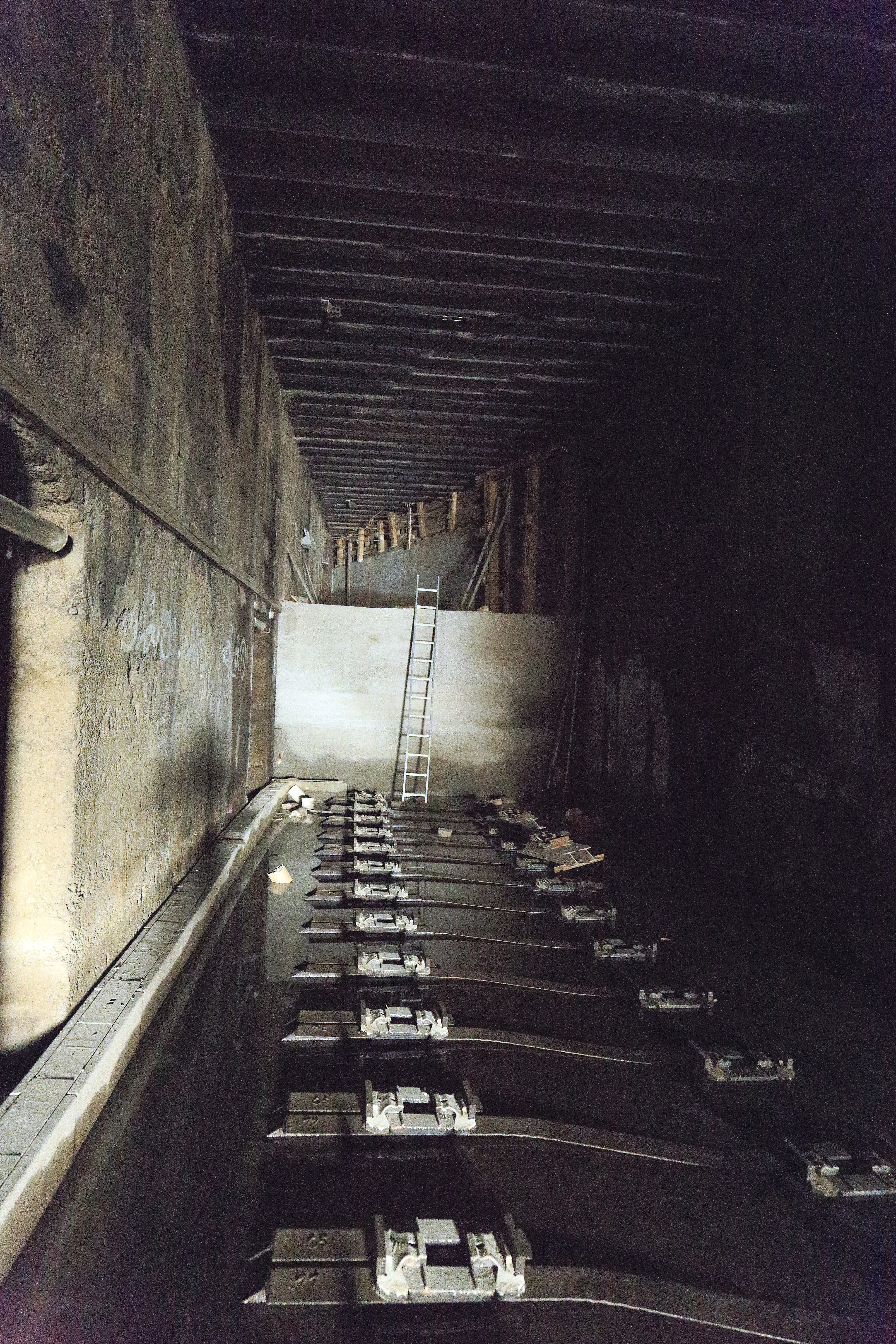 unterhalb der Gleise 12 und 13, den Stammgleisen der Strecke 5919 von Nürnberg.